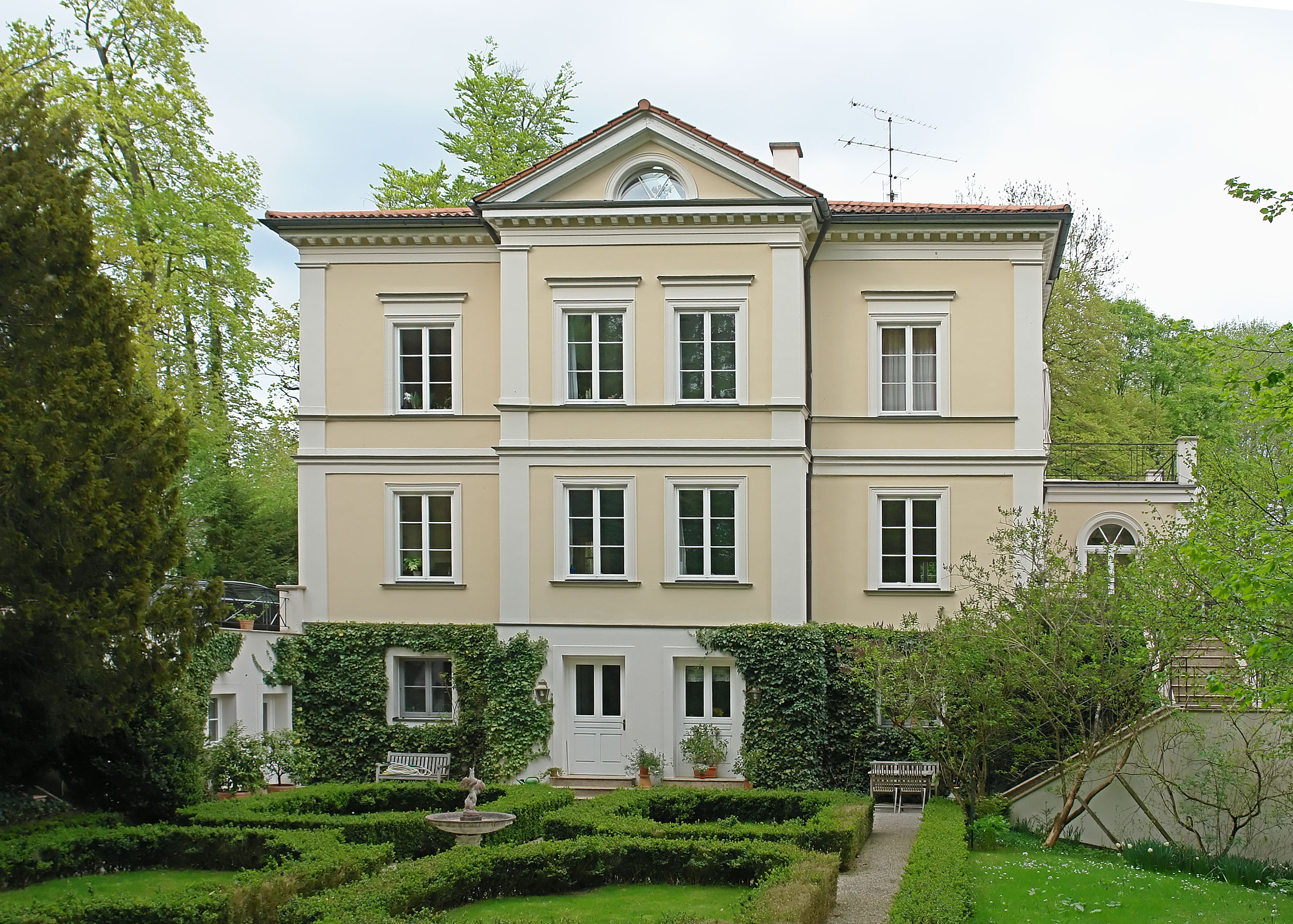 Feldafing: Villa Siedhoff (Villa Rosa), Seestraße 16. 1870 von Johann Biersack für sich selbst, dann für die Münchner Geldleiherin Adele Spitzeder erbaut (Veranda an der Ostseite 1935 von Xaver Knittl); mit Parkanlage, 19. Jh This is the photograph of an architectural monument. It is part of the list of cultural monuments of Bayern, no. D-1-88-118-34